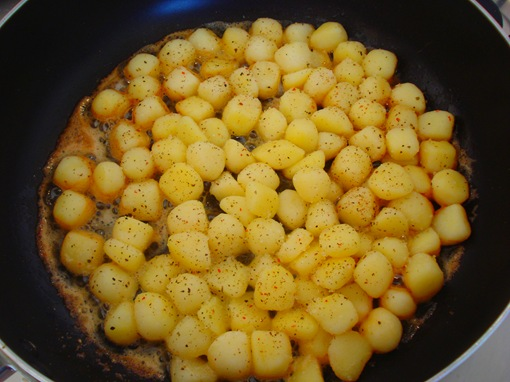 wikiwoordenboek foto